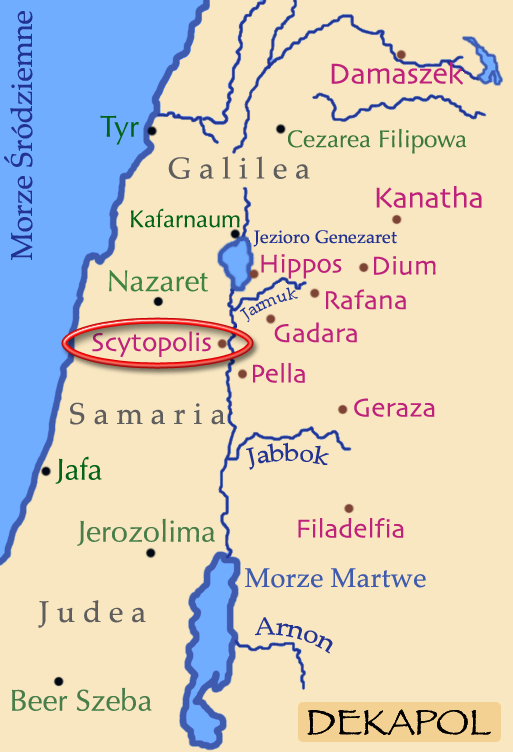 Mapka Dekapolu z zaznaczonym Scytopolis (Bet Szean)